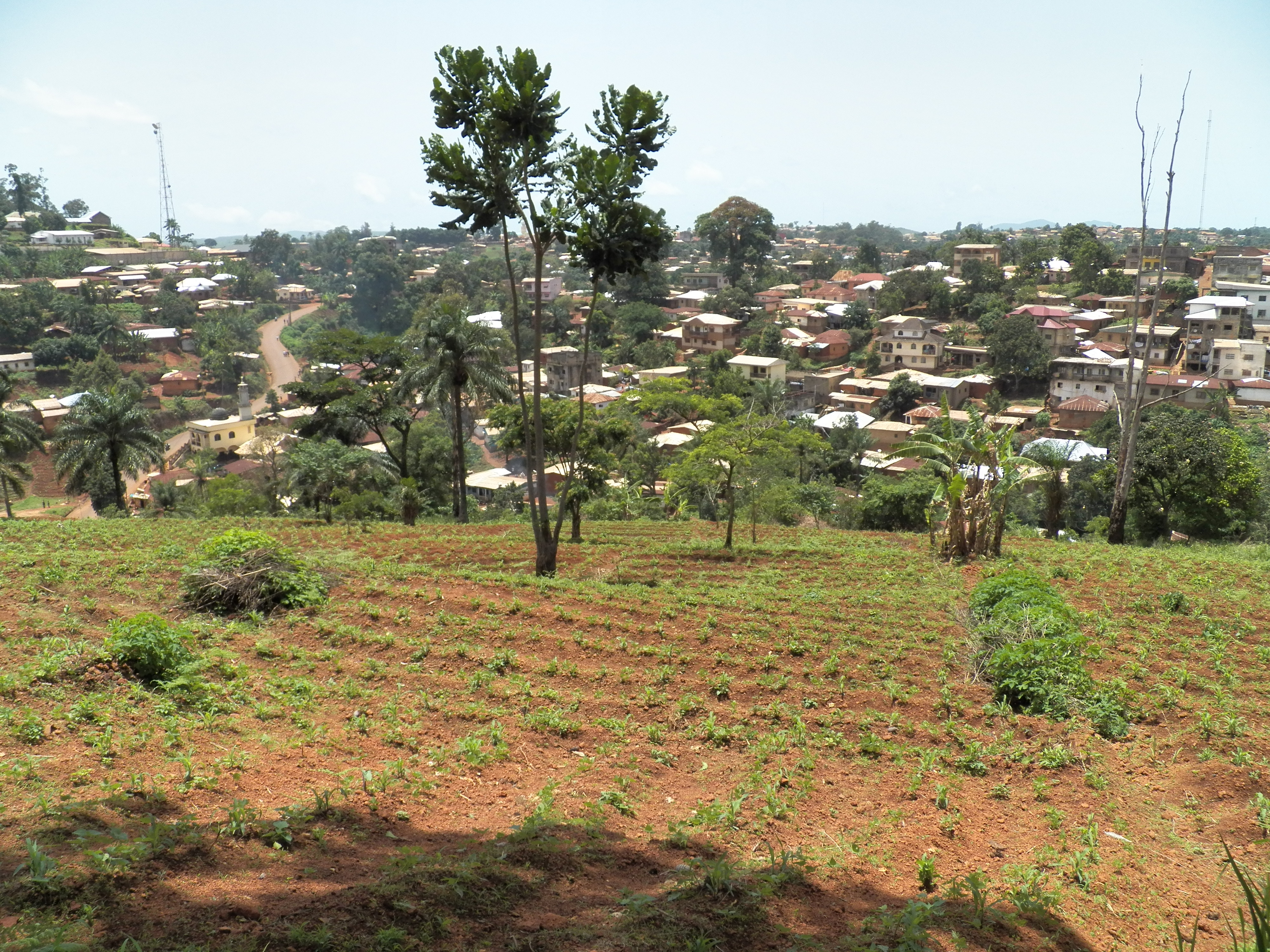 le village se modernise